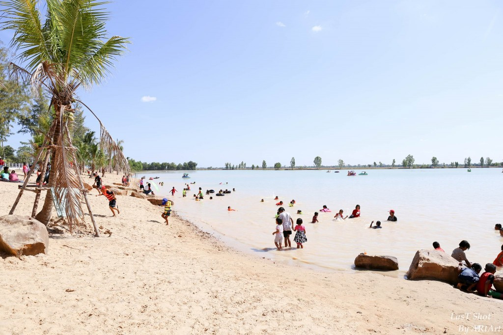 Hadprasattong nongki buriram